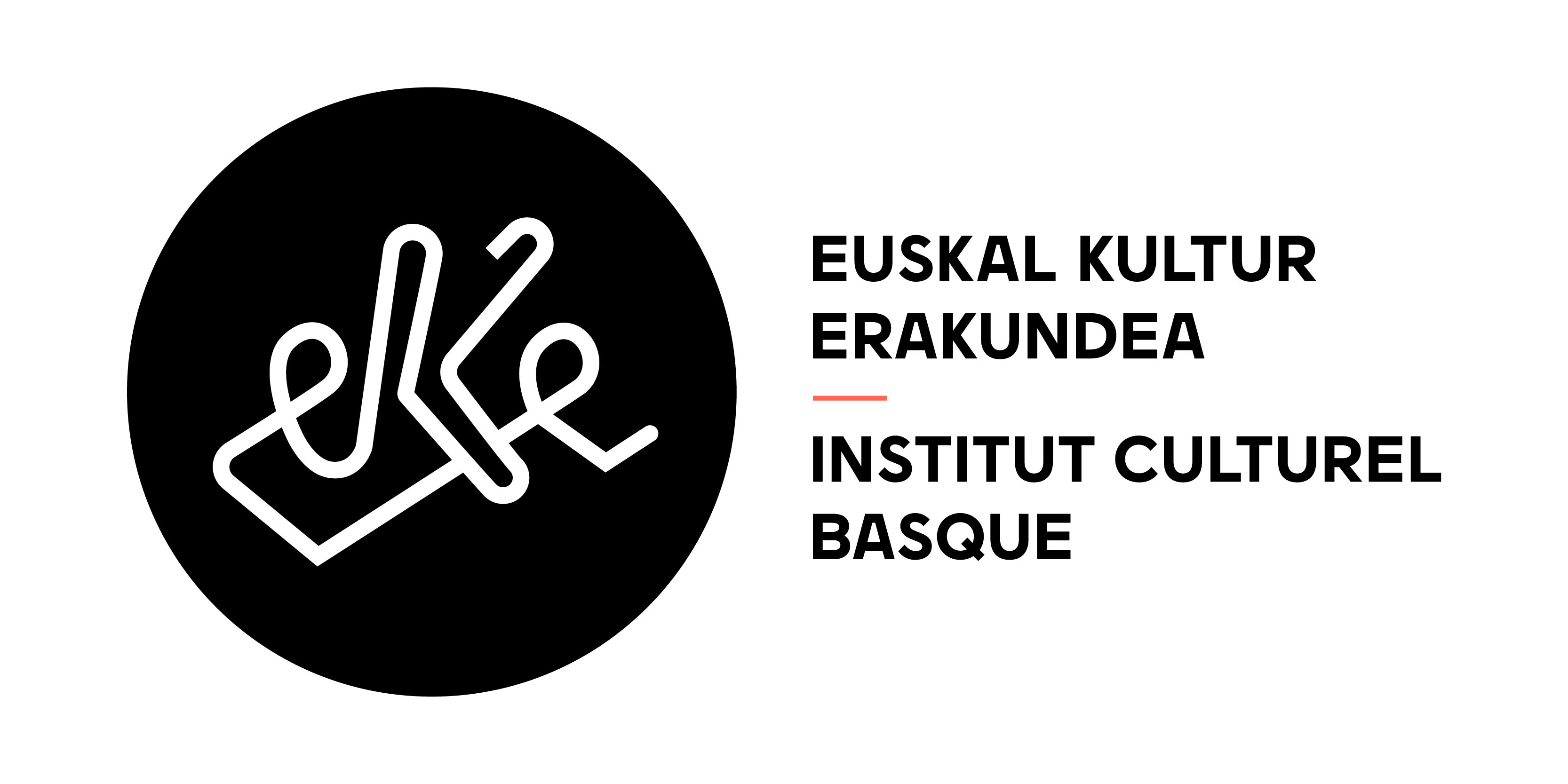 EKEren logoa